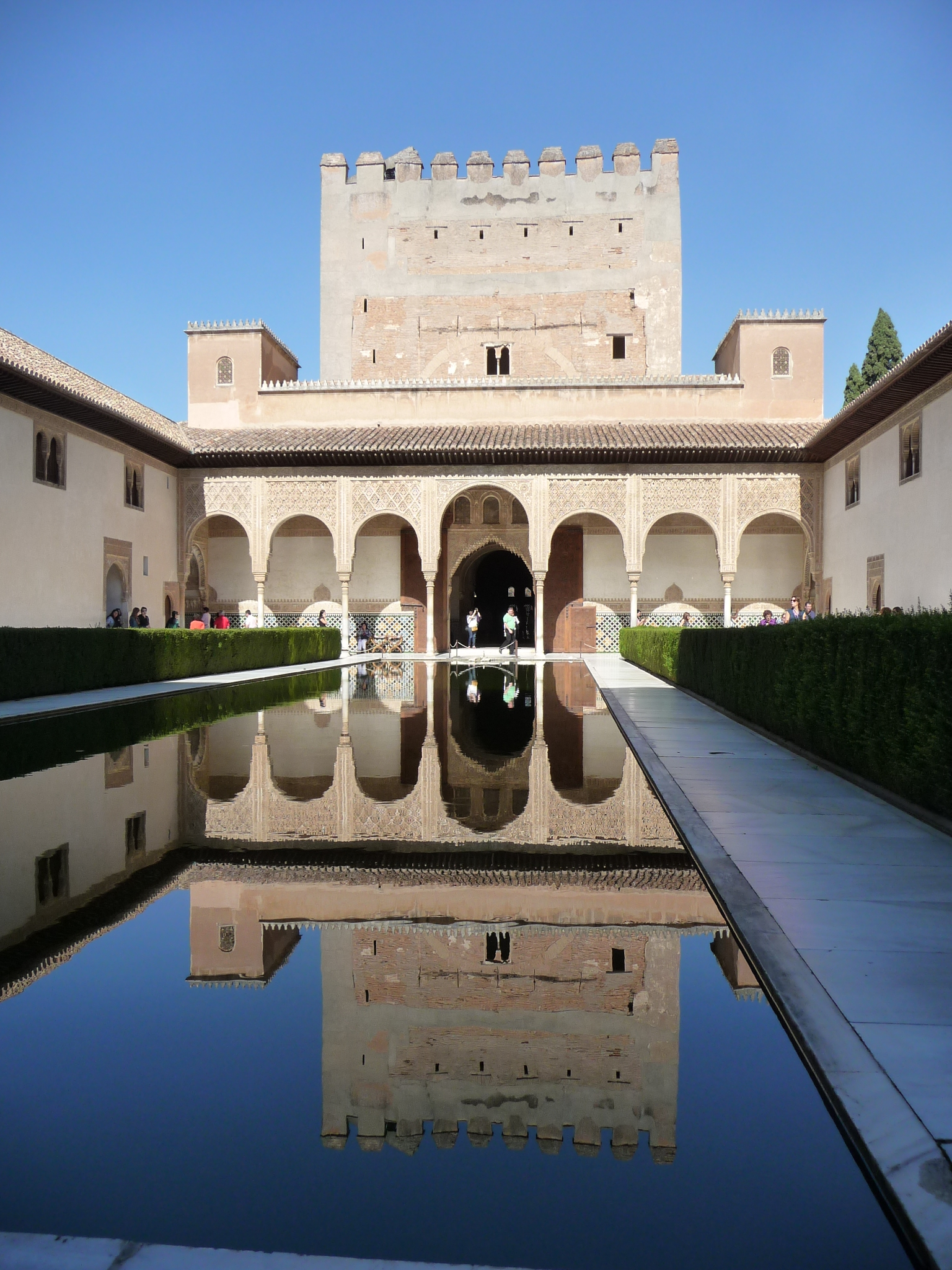 Granada-P1050040.JPG